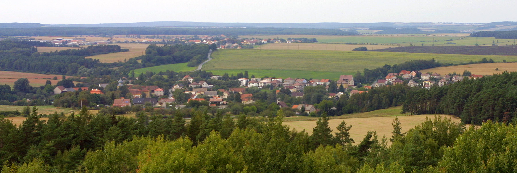 Pohled na ves Ledce od jihu.